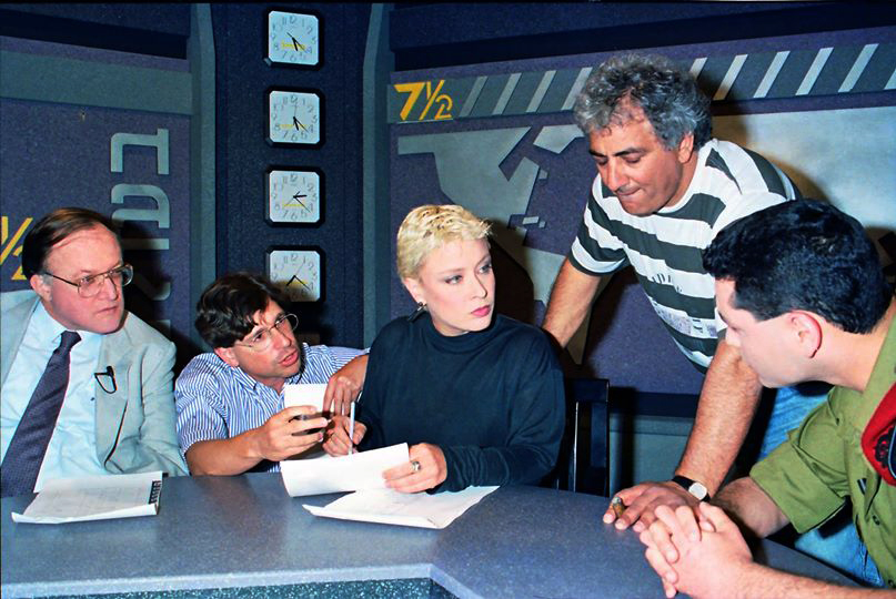 אורלי יניב באולפן שידורי הניסיון של ערוץ 2